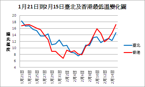 使用Excel軟體繪製結合，取與最低溫。